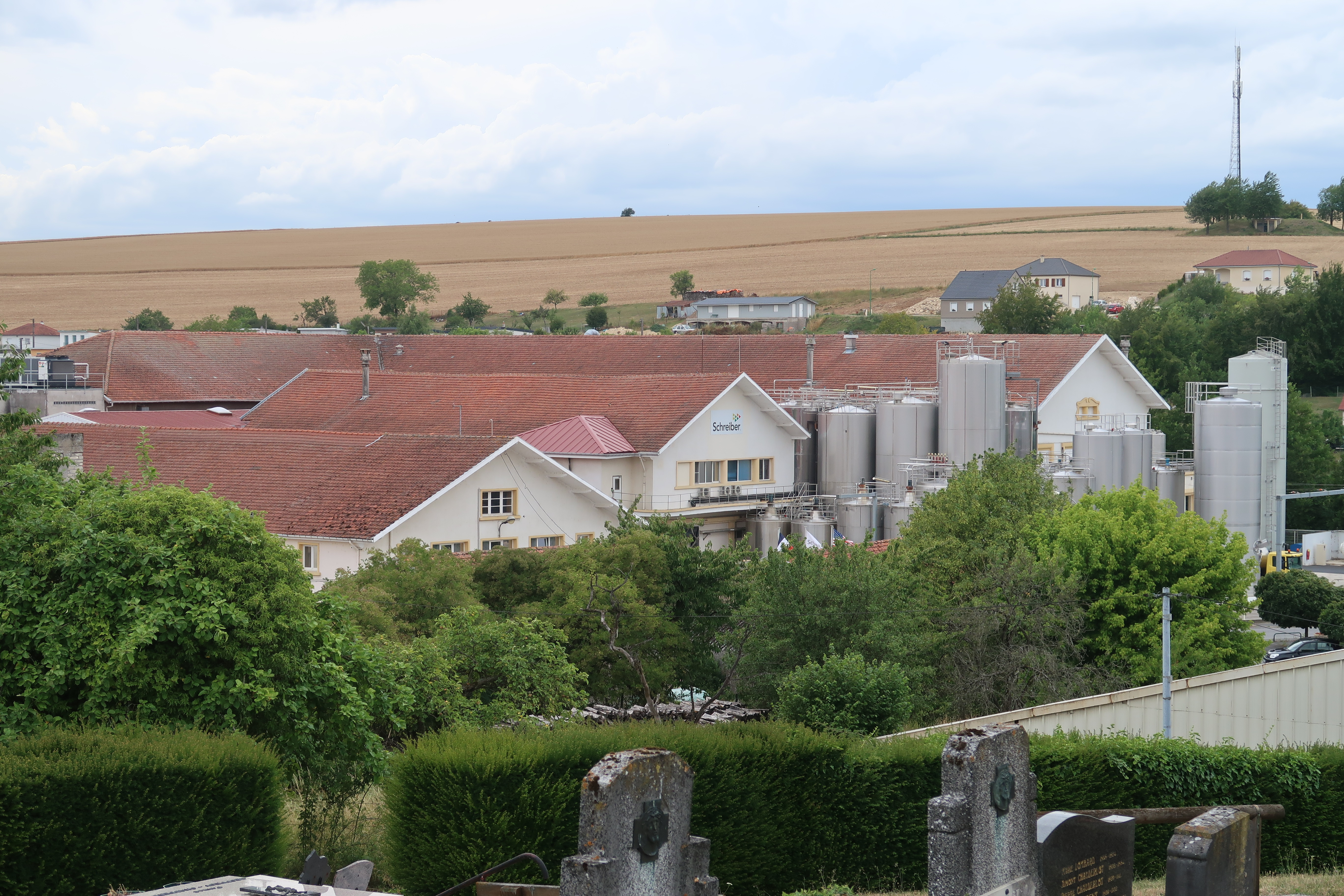 Cléry-le-Petit, laiterie Schreiber